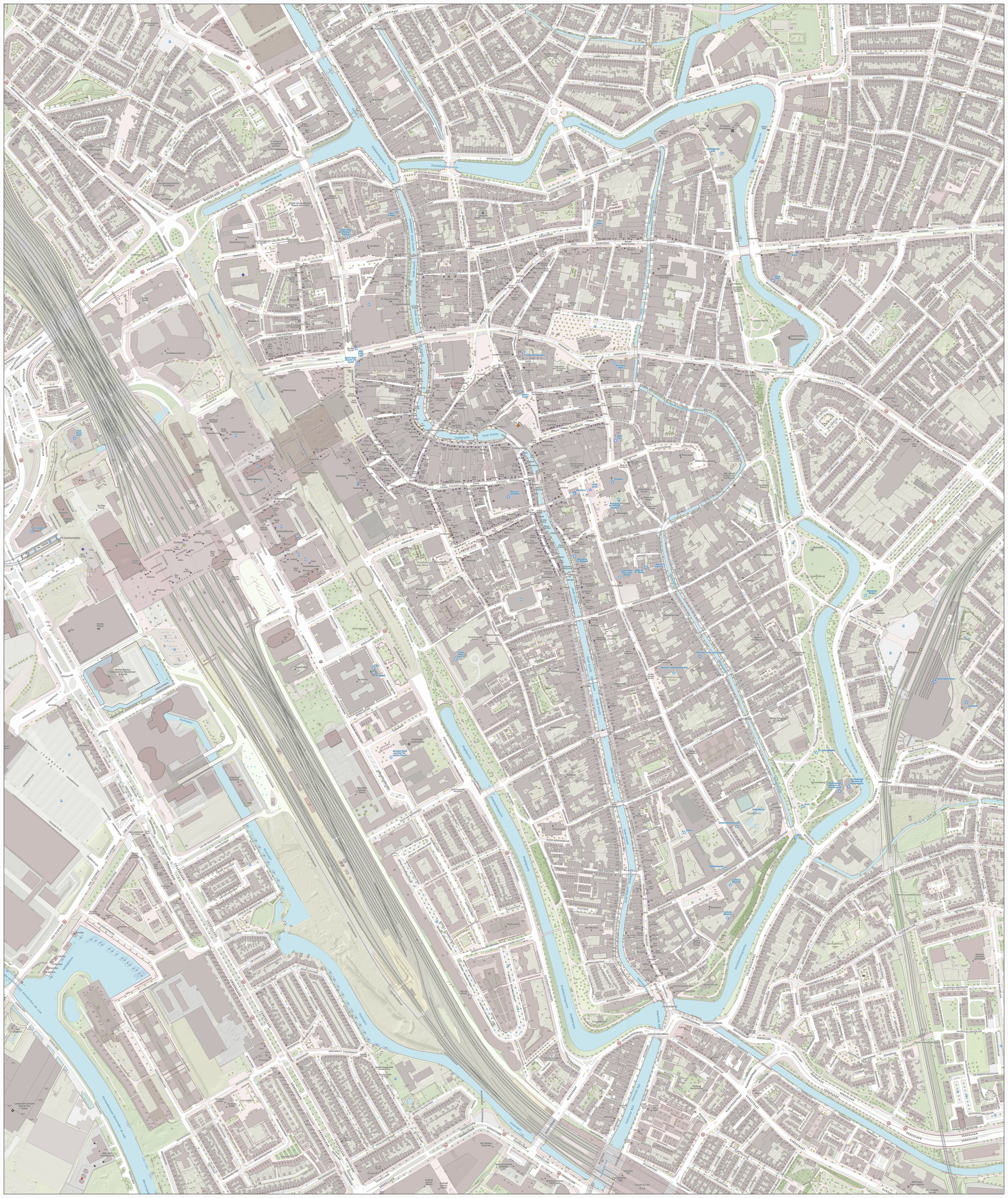 Topografische kaart van Utrecht (centrum van woonplaats). Resolutie: 2688 pixels/km. Kaartbeeld samengesteld uit de open geodata van de Basisregistratie Grootschalige Topografie (BGT), Creative Commons-BY Kadaster, en Top10NL en Top25namen (Basisregistratie Topografie, Kadaster), Creative Commons-BY Kadaster. Gebouwvlakken uit open geodata BAG extract, Creative Commons-BY Kadaster. Wegen uit de OpenStreetMap, CC-BY OpenStreetMap bijdragers. Reliëfschaduw uit de Actuele Hoogtekaart AHN2/AHN3. Samenstelling en kleurenschema: Jan-Willem van Aalst, met QGIS2. Zie ook de Legenda.